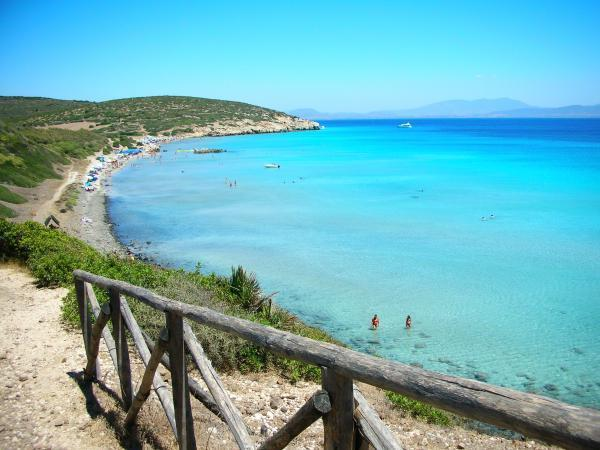 Spiaggia Coaquaddus, Sant'Antioco, Sud Sardegna